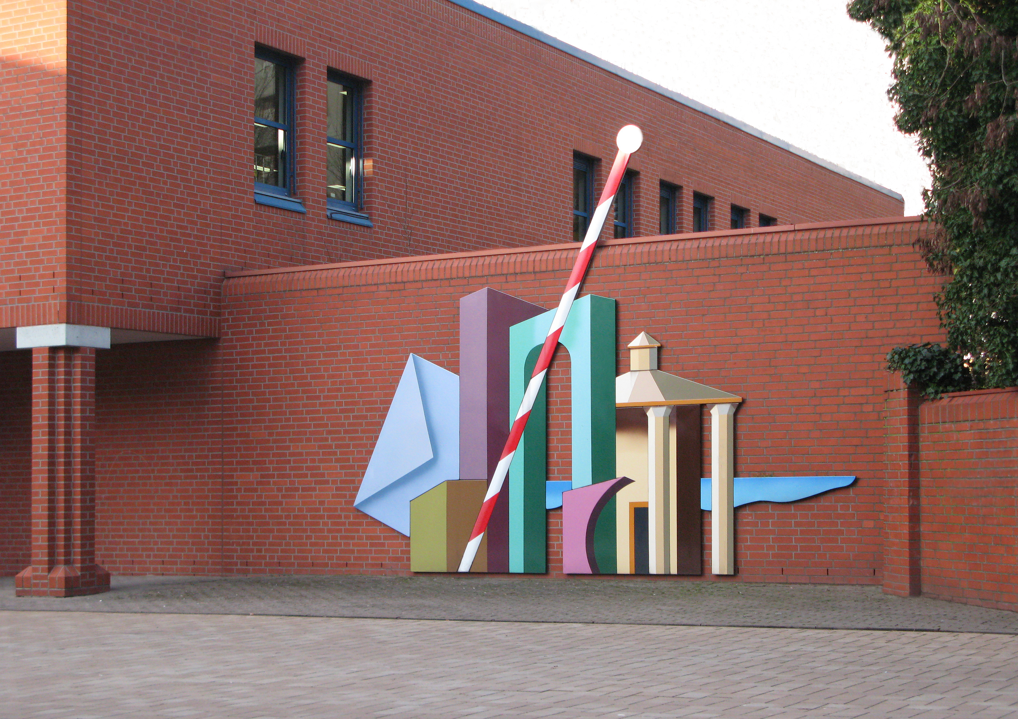 Aussenwandgestaltung der Post in Laatzen